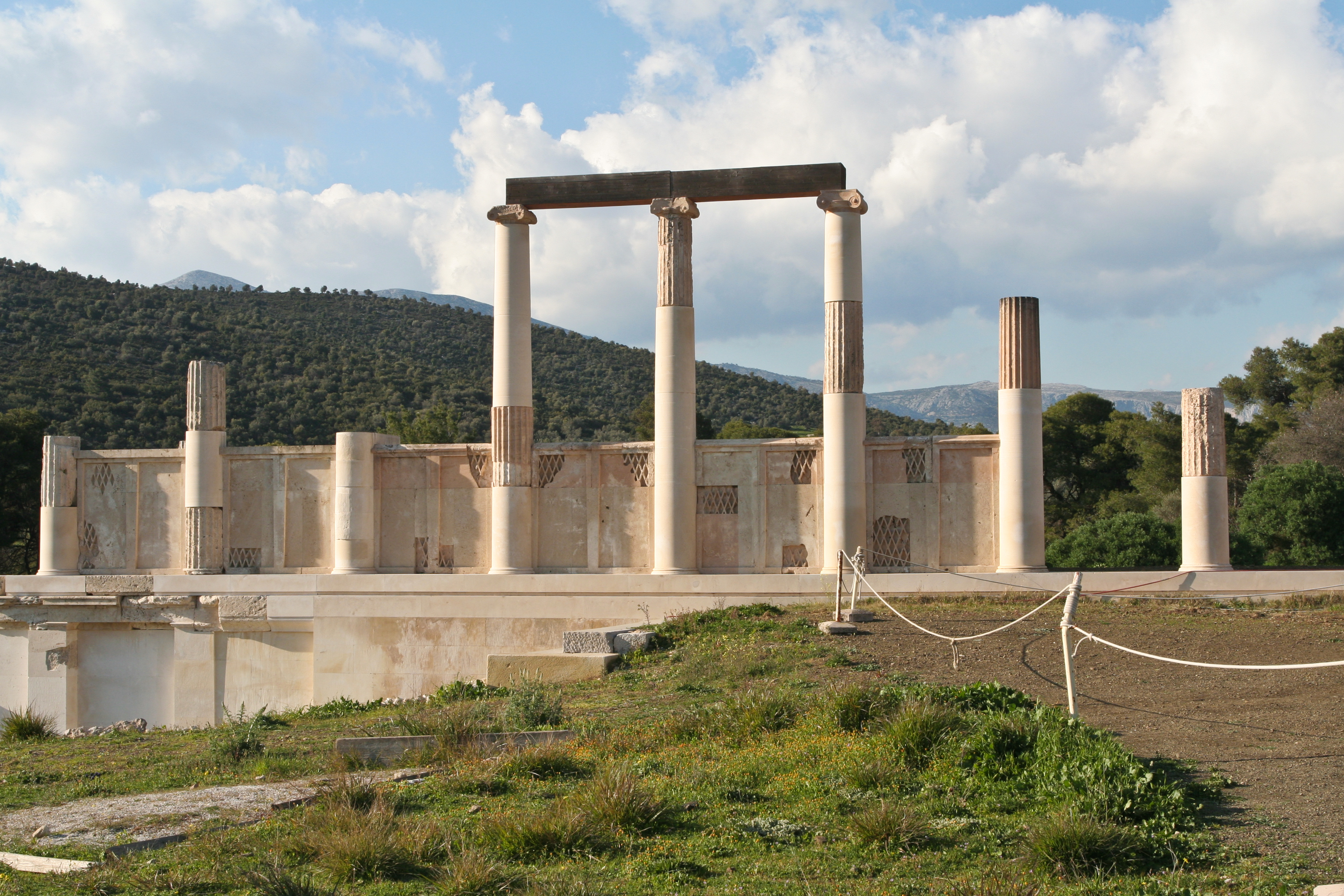 Asclepieion, Epidaurus